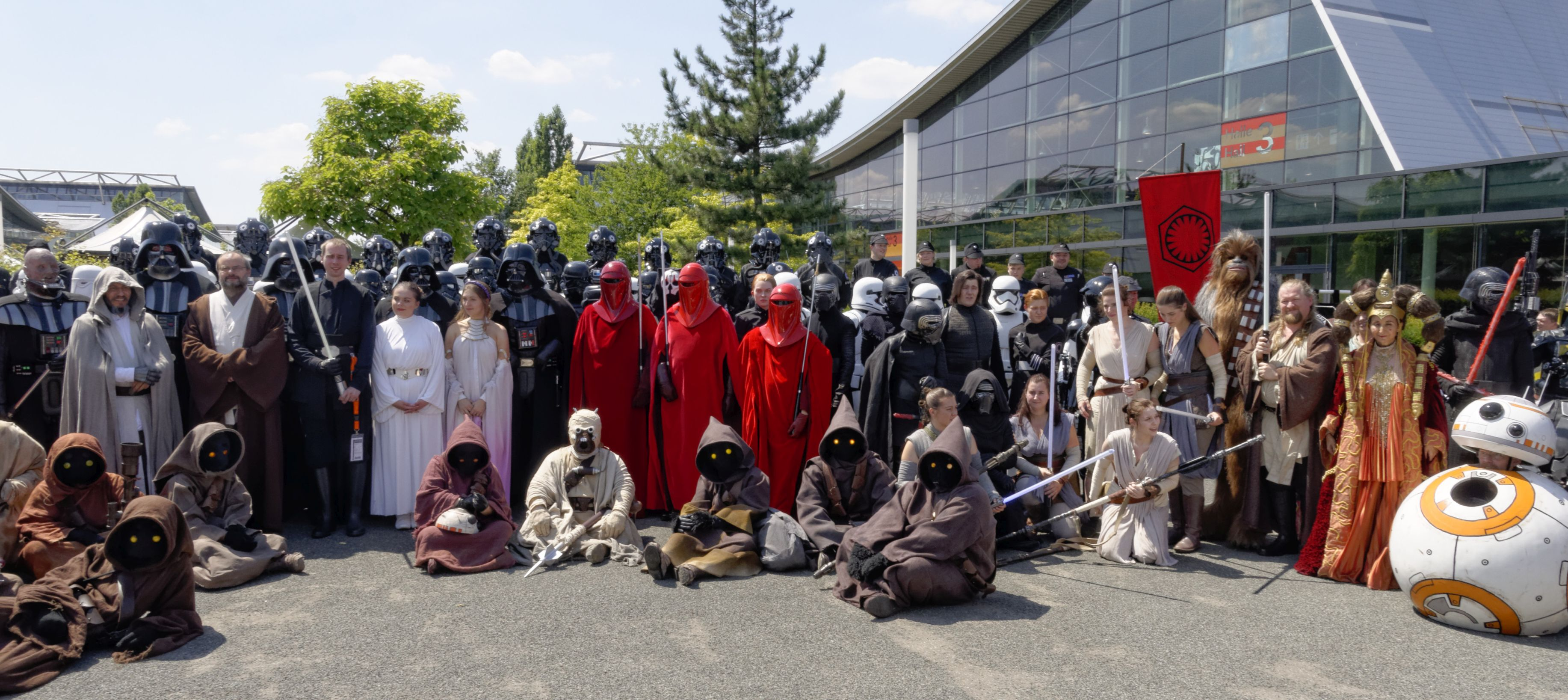 Bilder von der Comic Con Germany in Stuttgart 2018